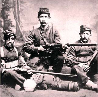 Fotografía de soldados chilenos, captada en estudio, en Lima, poco despues de la captura de la capital durante la Guerra del Pacifico. 1881. Soldados Batallón Valparaíso